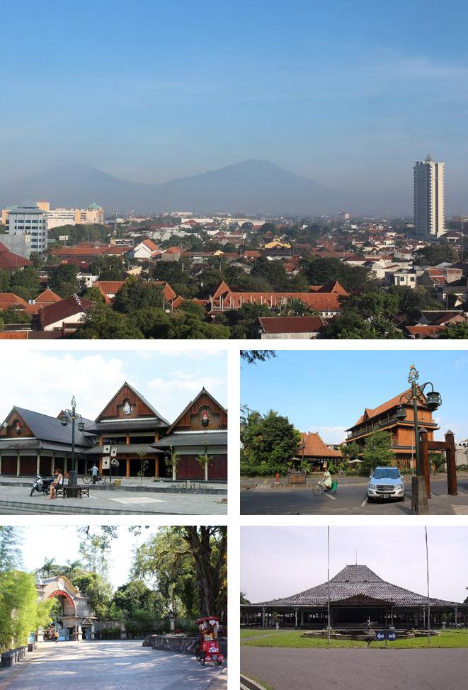 Collage of Surakarta: Skyline, Omah Sinten; Mangkunegaran Palace, Sriwedari, Windujenar Market